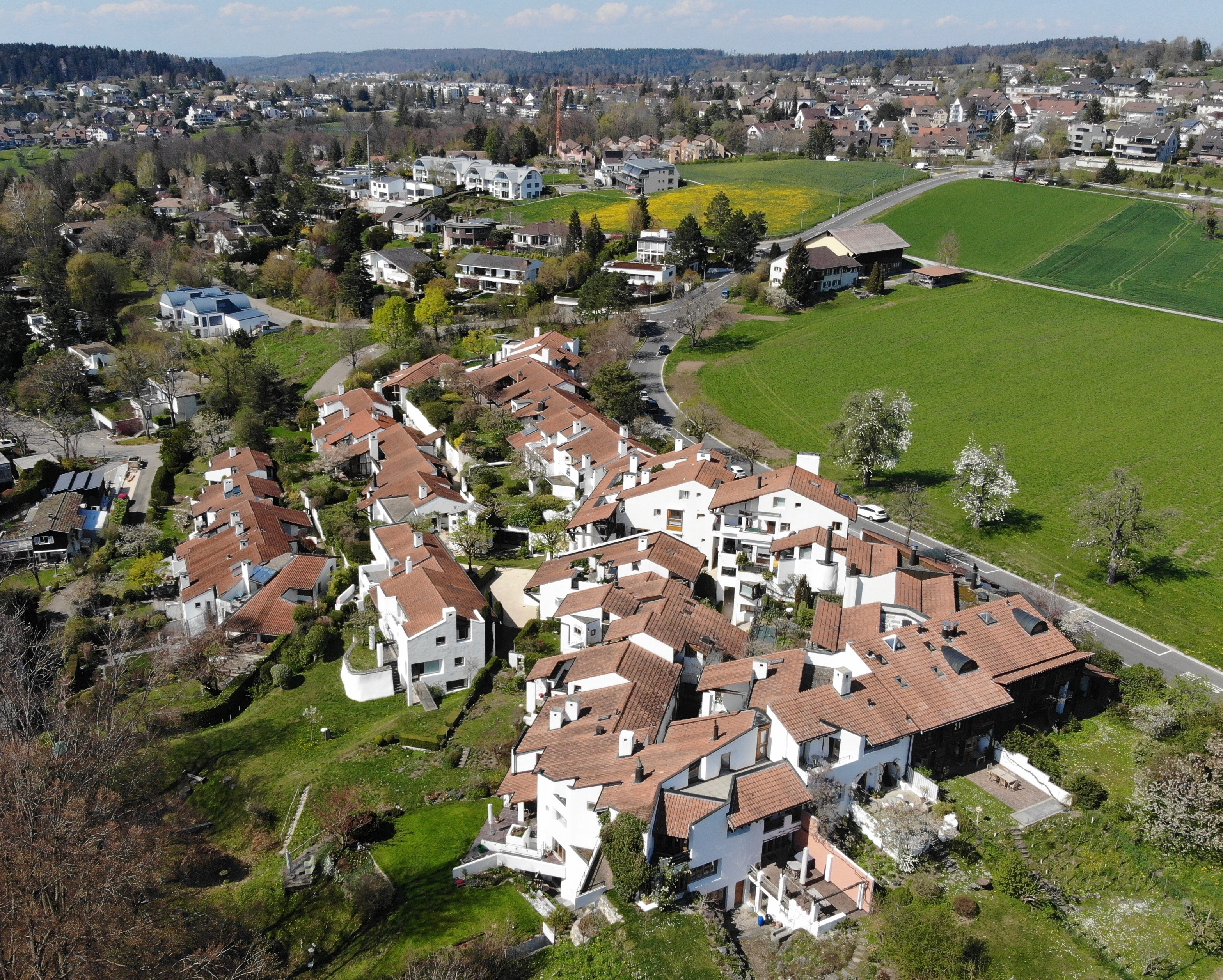 Seldwyla, Ansicht von SO